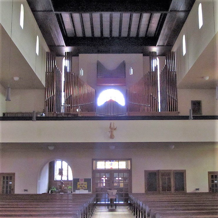 Blick ins Innere der katholischen Pfarrkirche „Zu den heiligen Schutzengeln“ in Schaffhausen, einem Ortsteil der Gemeinde Wadgassen, Saarland